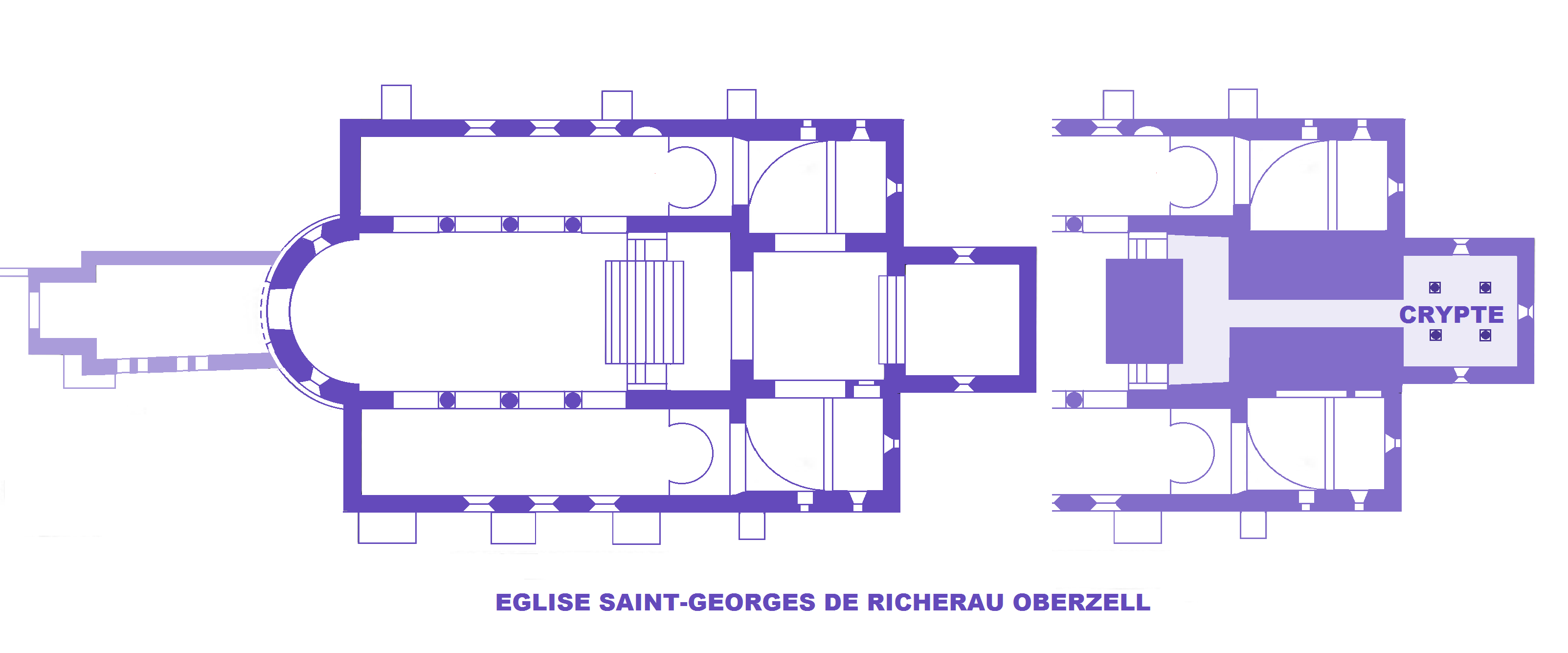 Eglise Saint-Georges de Richenau-Oberzell, Plan